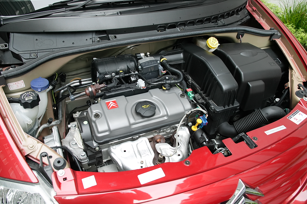 Citroën C3 TU3 1.4l 8V Petrol engine